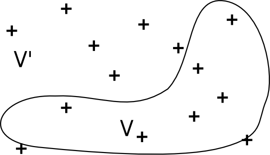 png verze,rozložení bodů při metodě Monte Carlo